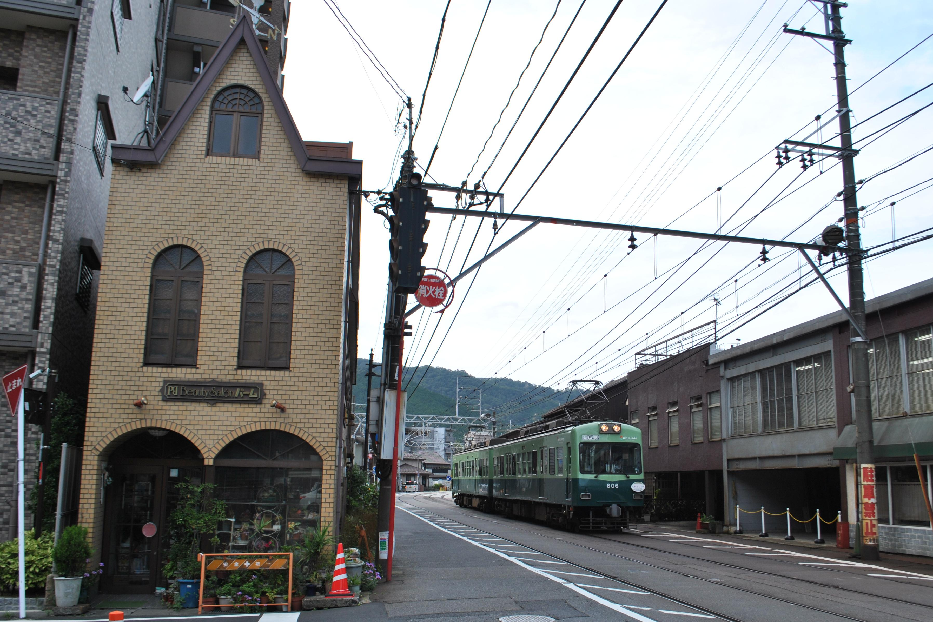 京阪電気鉄道の600形車浜大津〜三井寺間にて